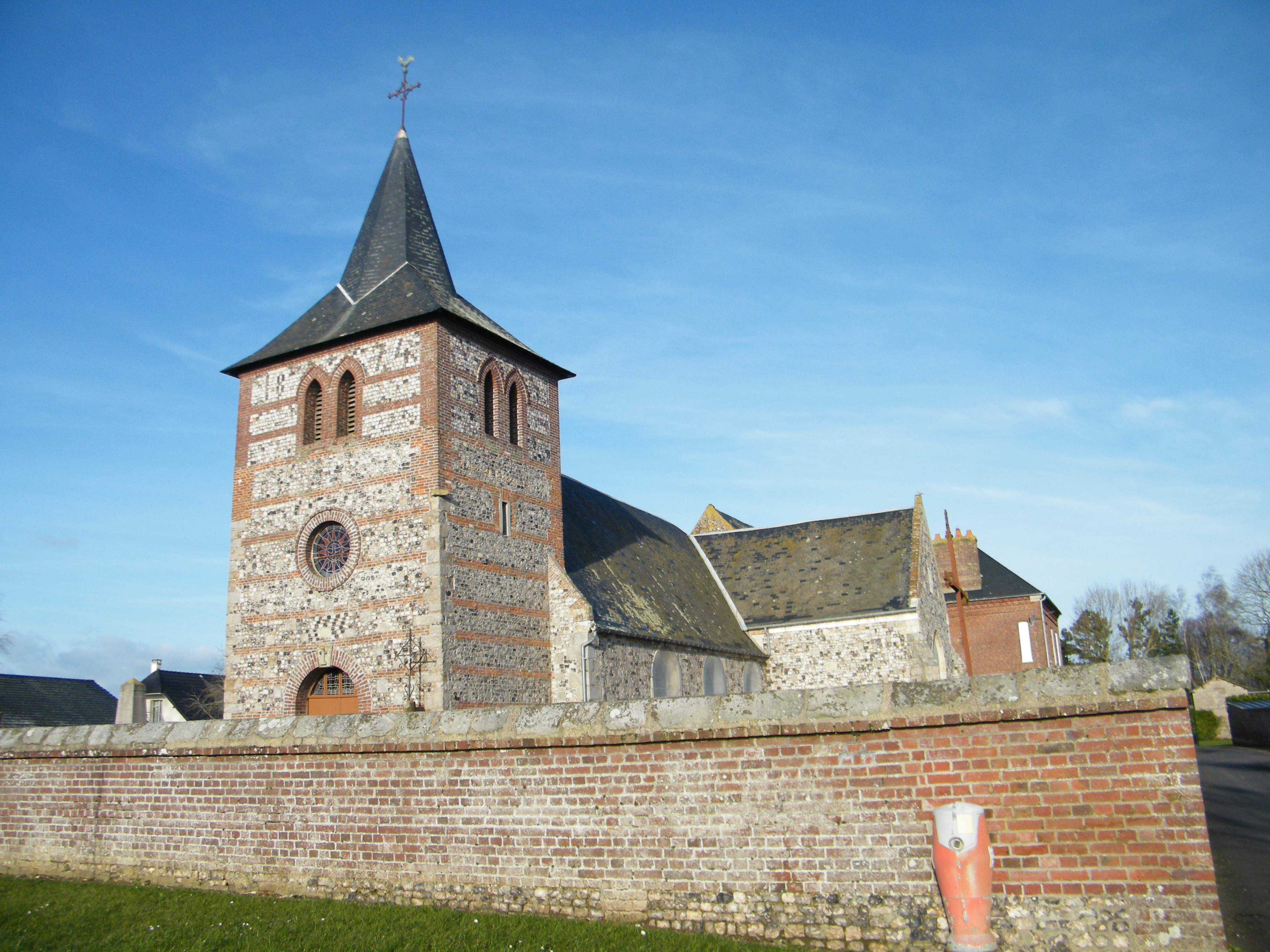 L'église de 1874.